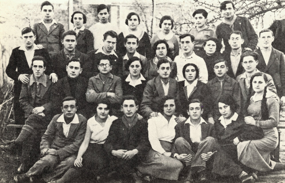 פלוגת מאקוב (חוות גרוכוב) - 1935